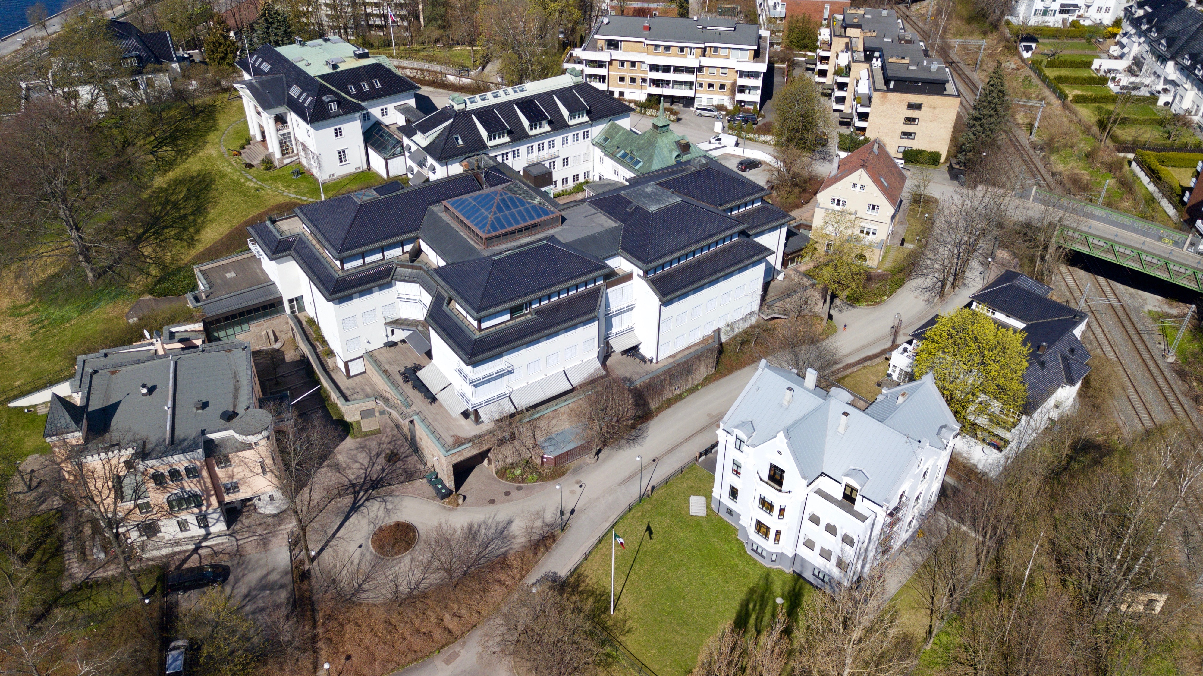 Frøyas gate i Oslo.